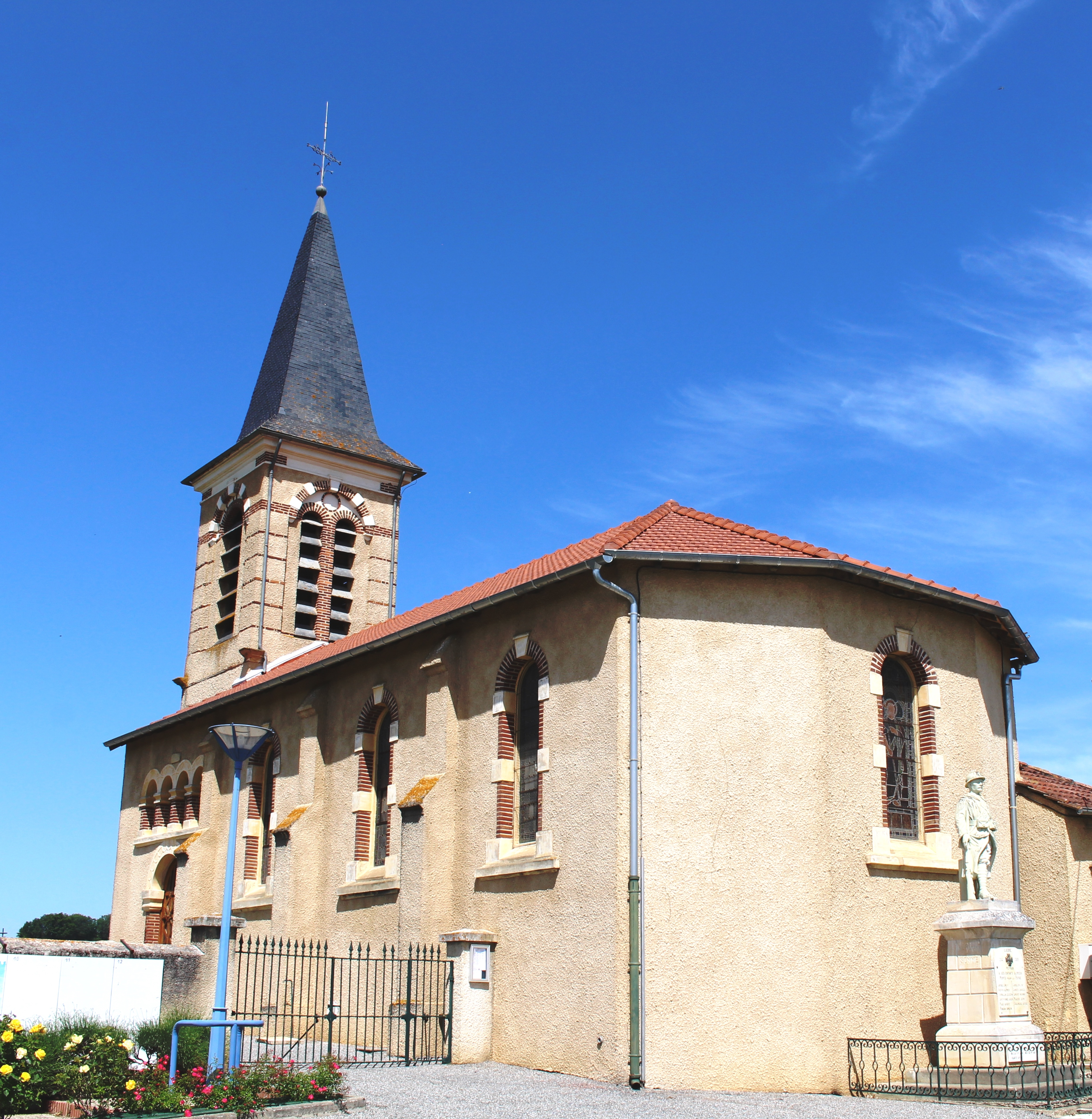 Église Saint-Martin de Peyrun (Hautes-Pyrénées)